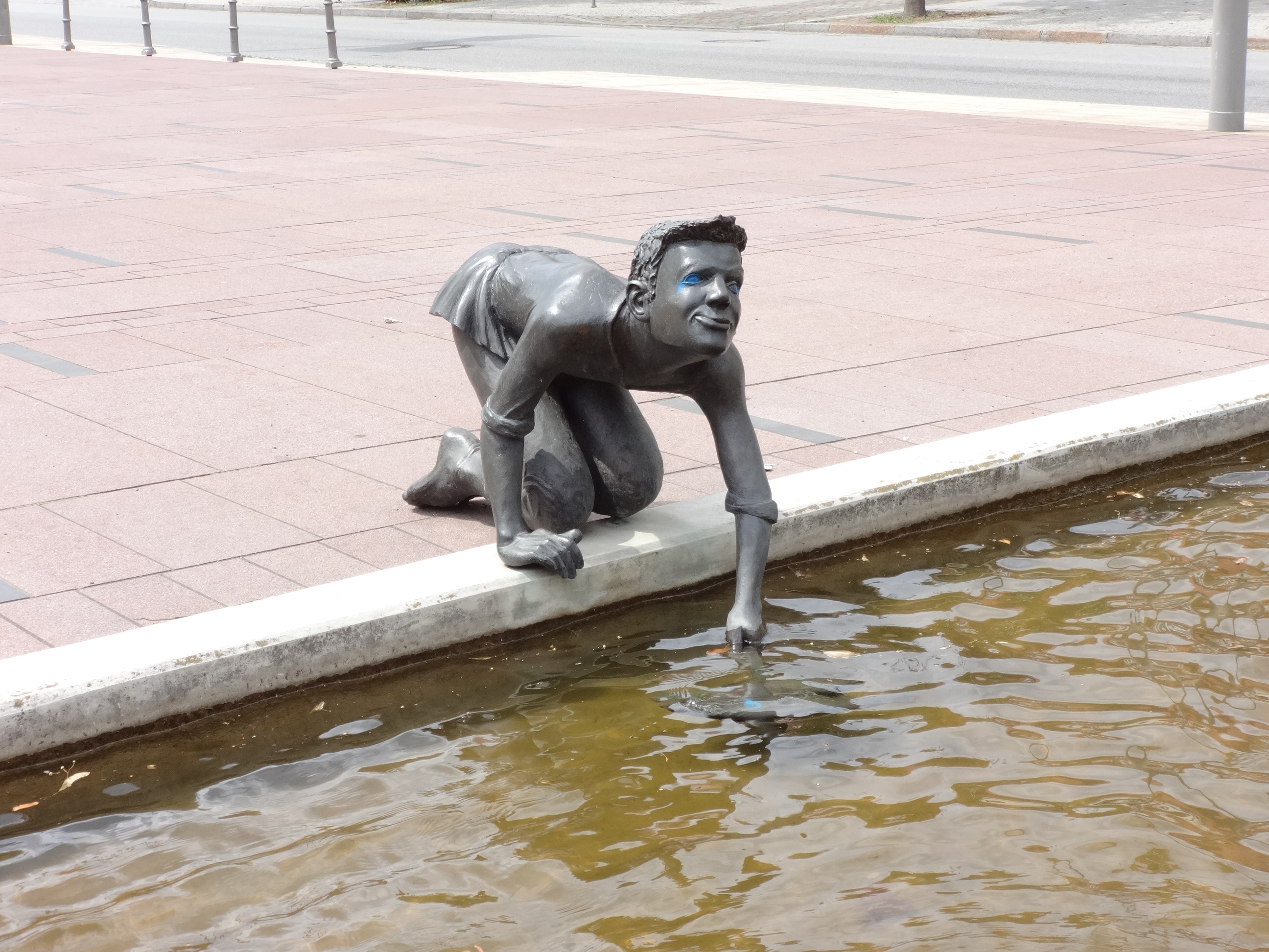 Mit dem Clauert-Rundweg ehrt die Stadt Trebbin den "märkischen Eulenspiegel" Hans Clauert, der im 16. Jahrhundert seinen Schabernack trieb. Figuren aus Bronze und Holz sowie markante Plätze sind nach ihm benannt.